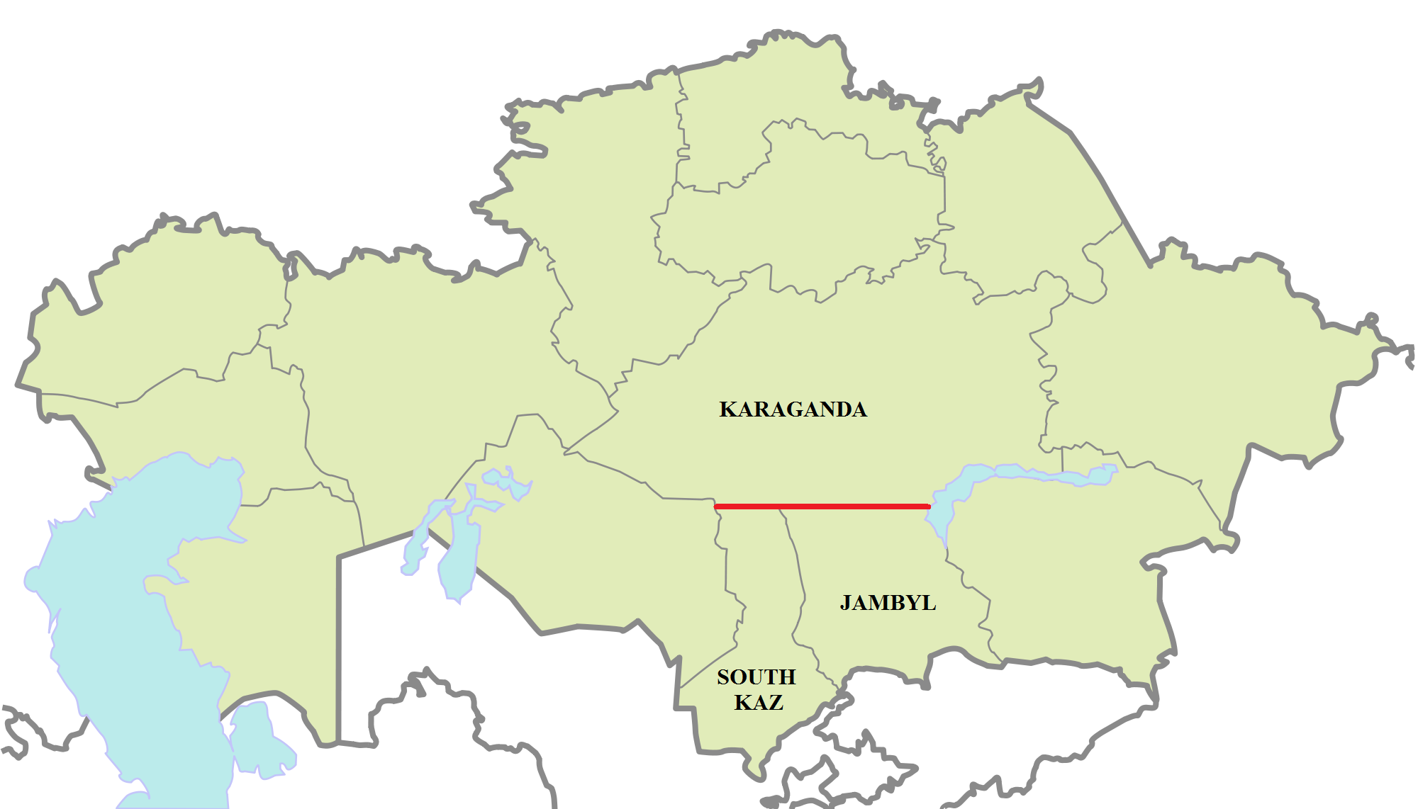 46 параллель проходит по границе Карагандинской, Южно-Казахстанской, Жамбылской областей